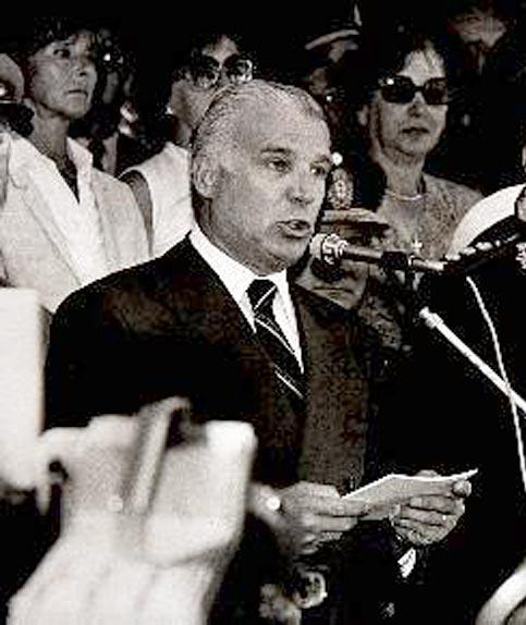 El Intendente (de facto) Brigadier (R) Osvaldo Cacciatore da un discurso junto al Presidente (de facto) Leopoldo Galtieri, en 1982.